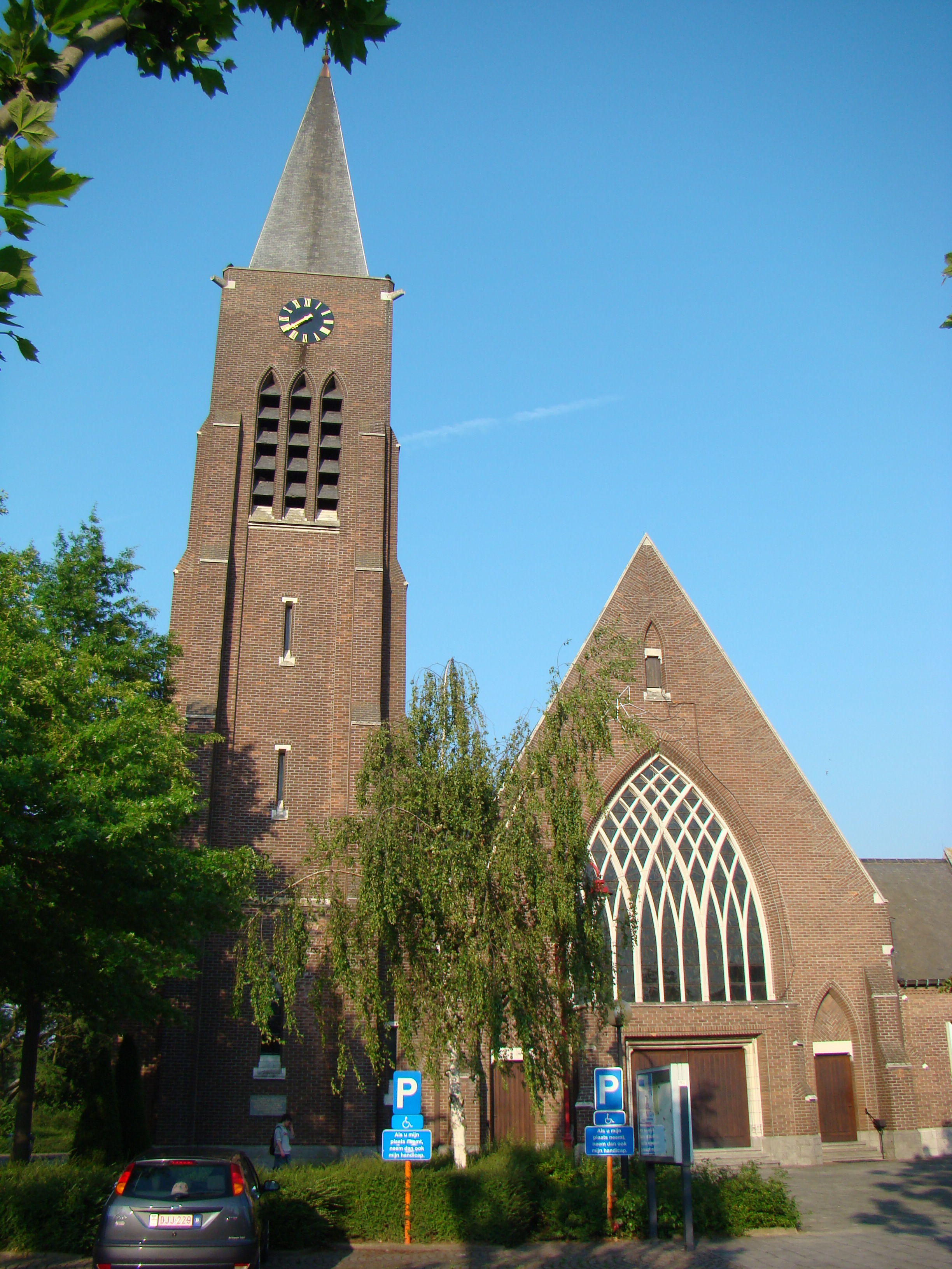 Wielsbeke Sint-Laurentius kerkSaint-Laurentius church, Wielsbeke, West Flanders, Belgium